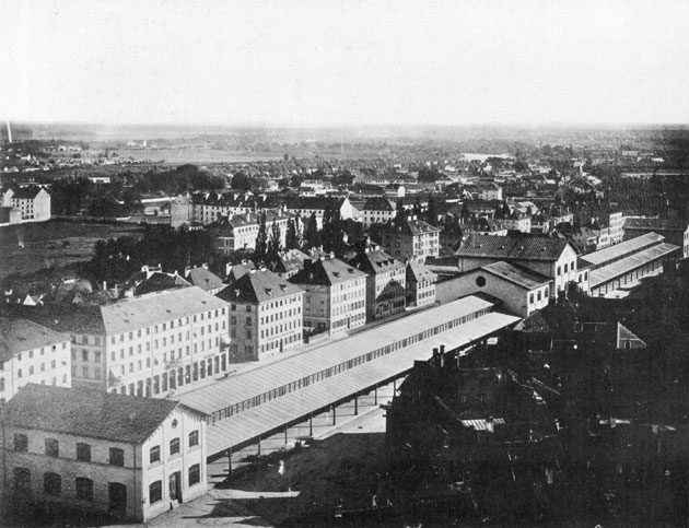 Die Schrannenhalle in München, Teil eines Panoramas vom Petersturm aus.